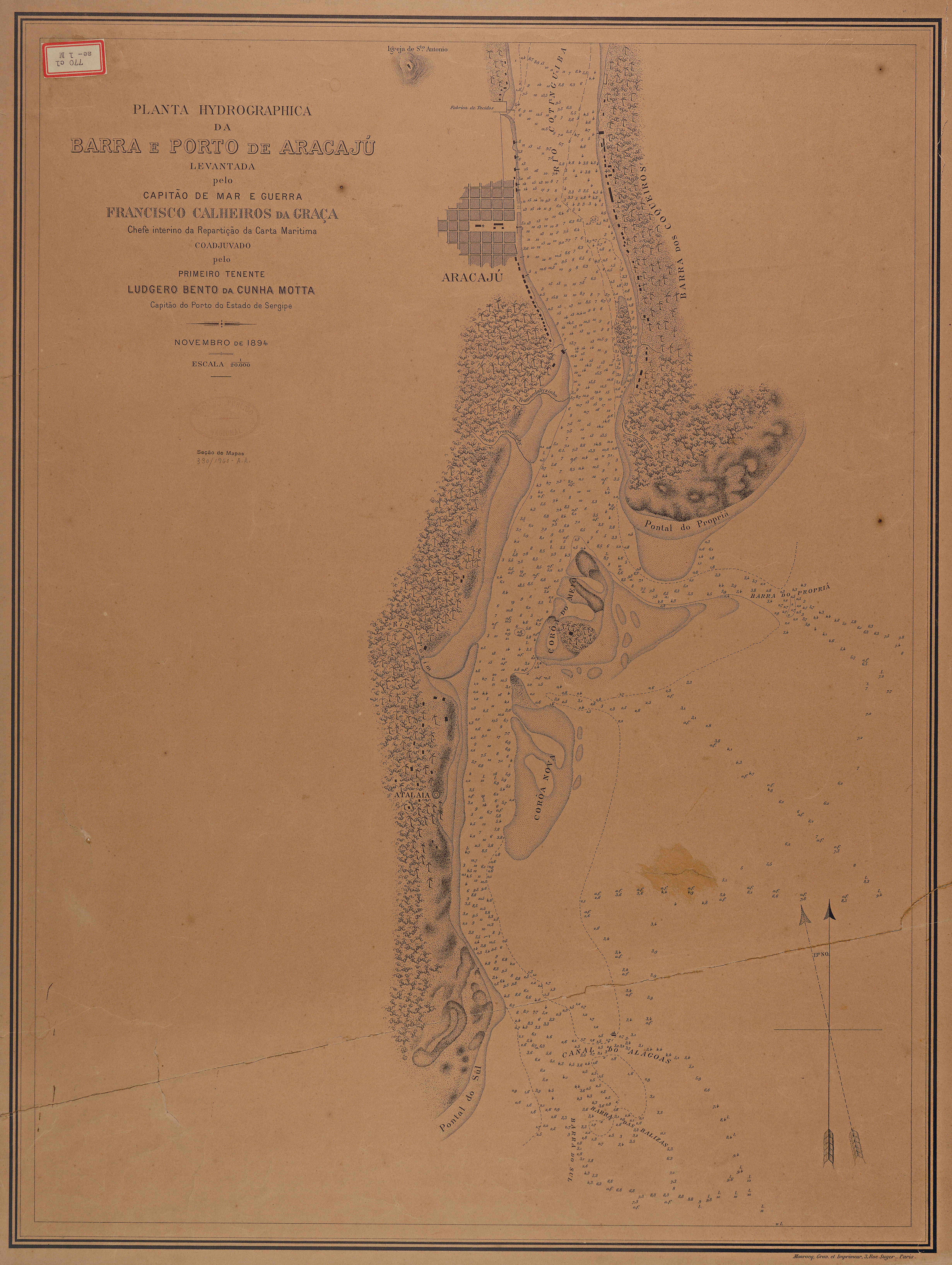 Planta Hidrográfica da Barra e Porto de Aracaju, 1894.